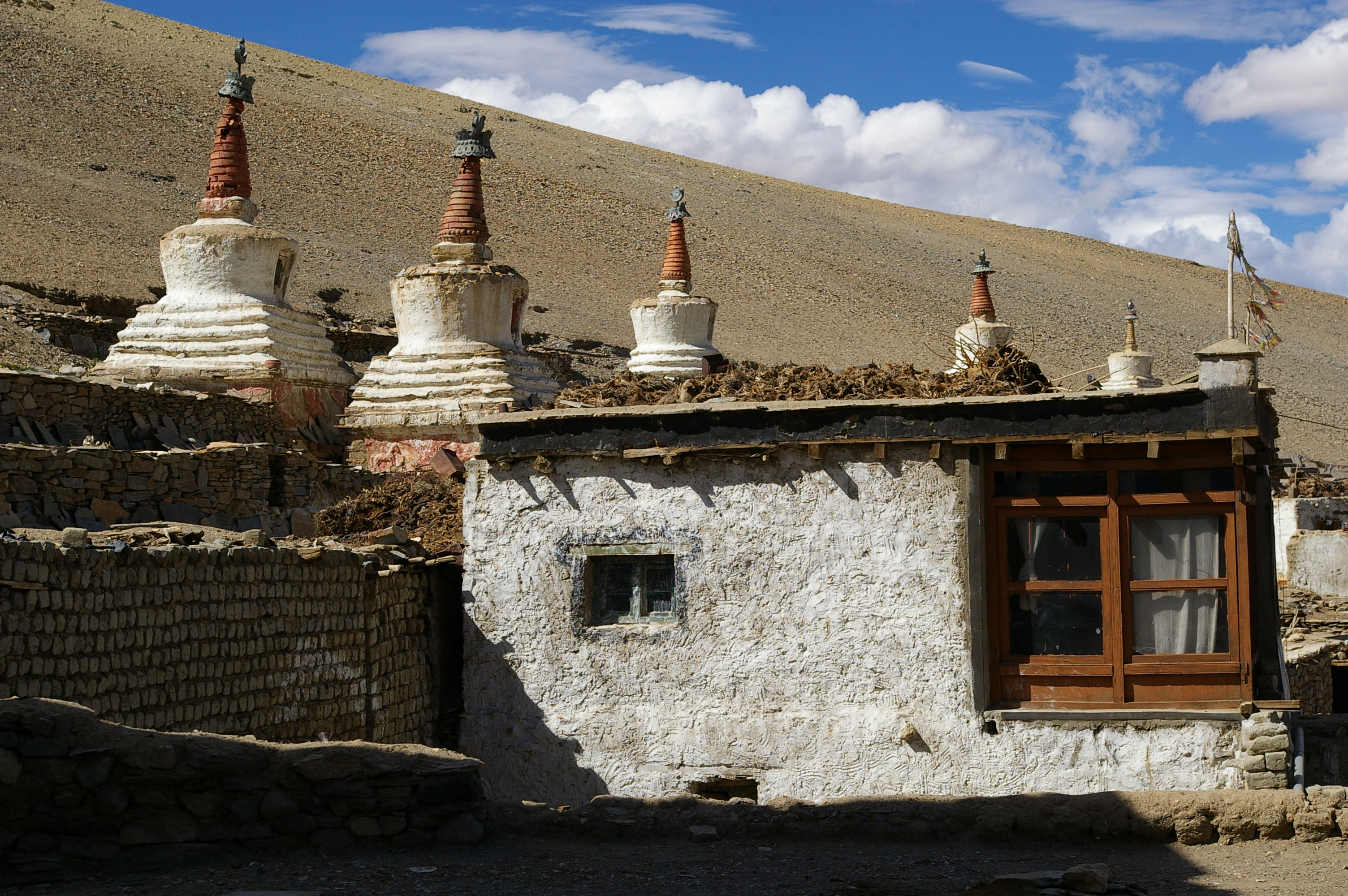 Chorten in Korzok